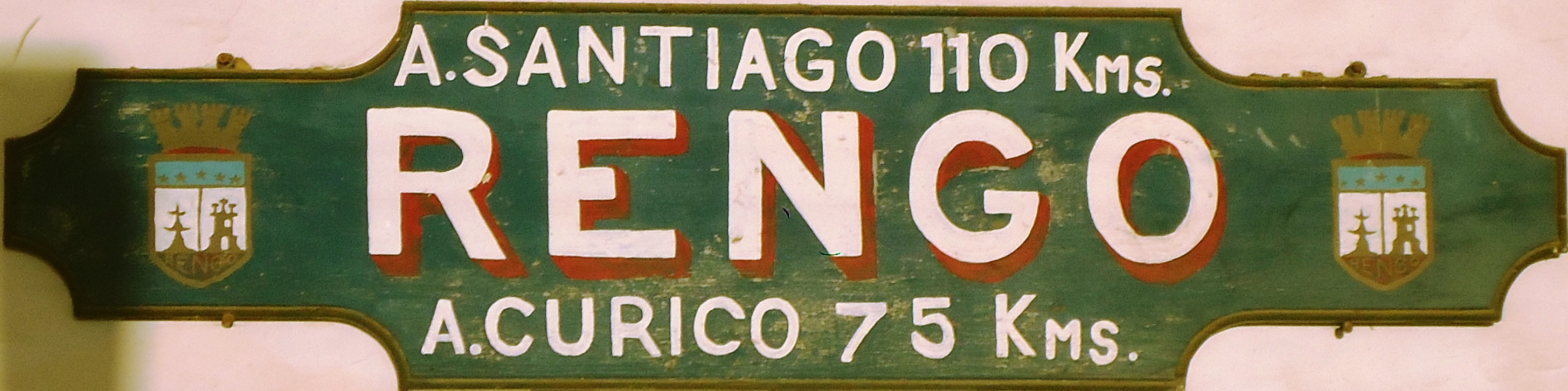 Letrero ubicado en la Estación de Ferrocarriles de Rengo, el cual indica las distancias hacia Curicó y Santiago.